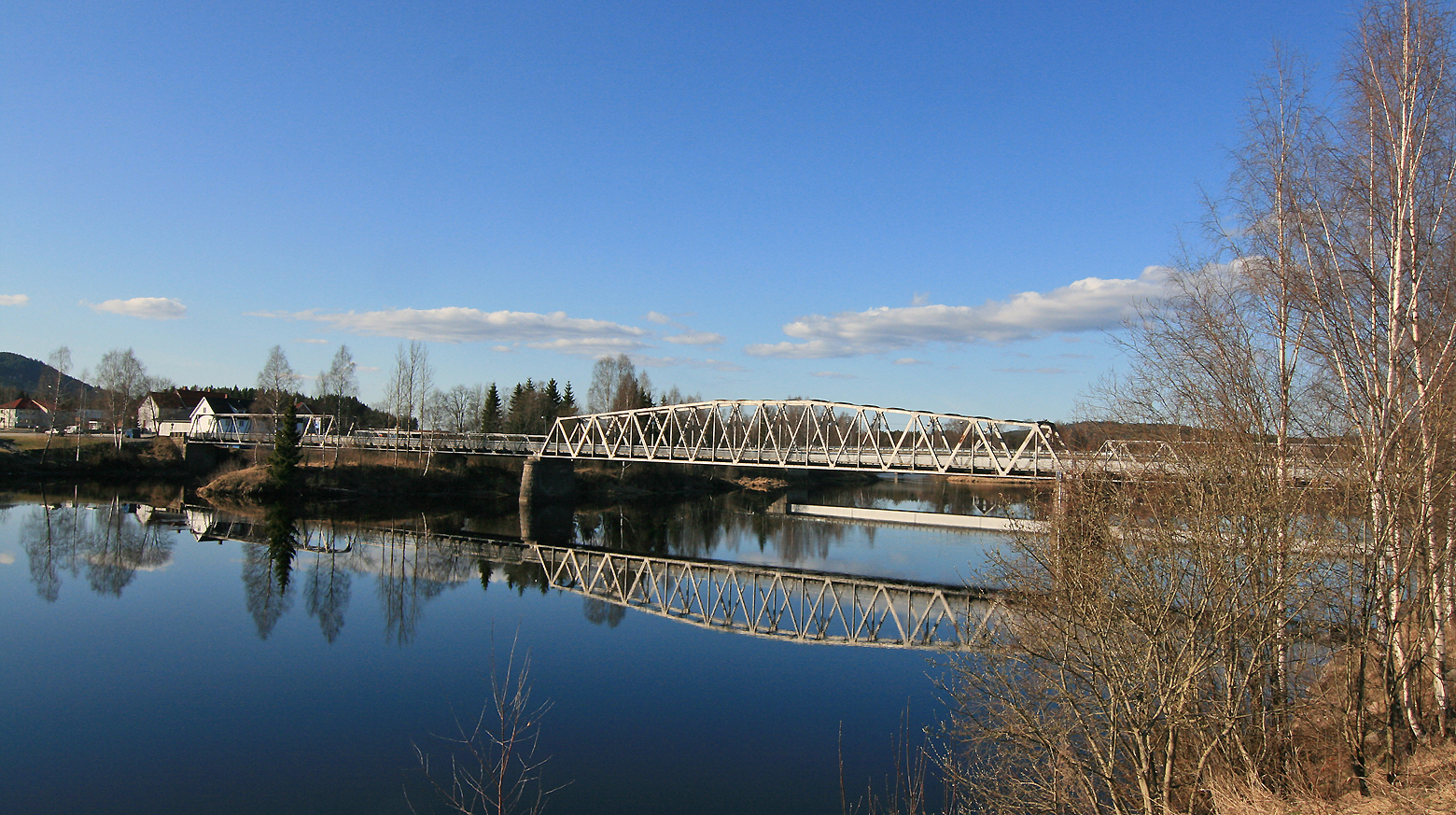 Bru over Glomma ved Skarnes, Sør-Odal.